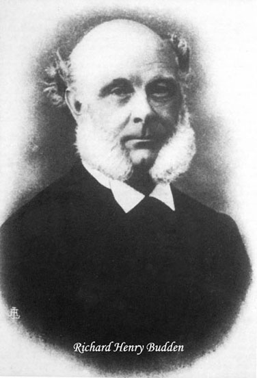 Ritratto di Richard Henry Budden (1826-1895) detto l’Apostolo dell’Alpinismo”.